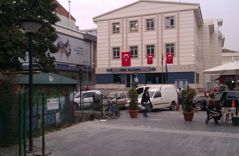 Düzce il merkezi spor sokak girişi